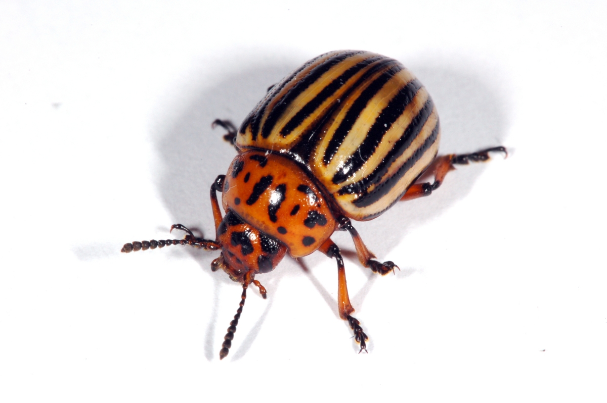 Leptinotarsa decemlineata, Selzerbrunnen, Frankfurt am Main, Hessen, Deutschland